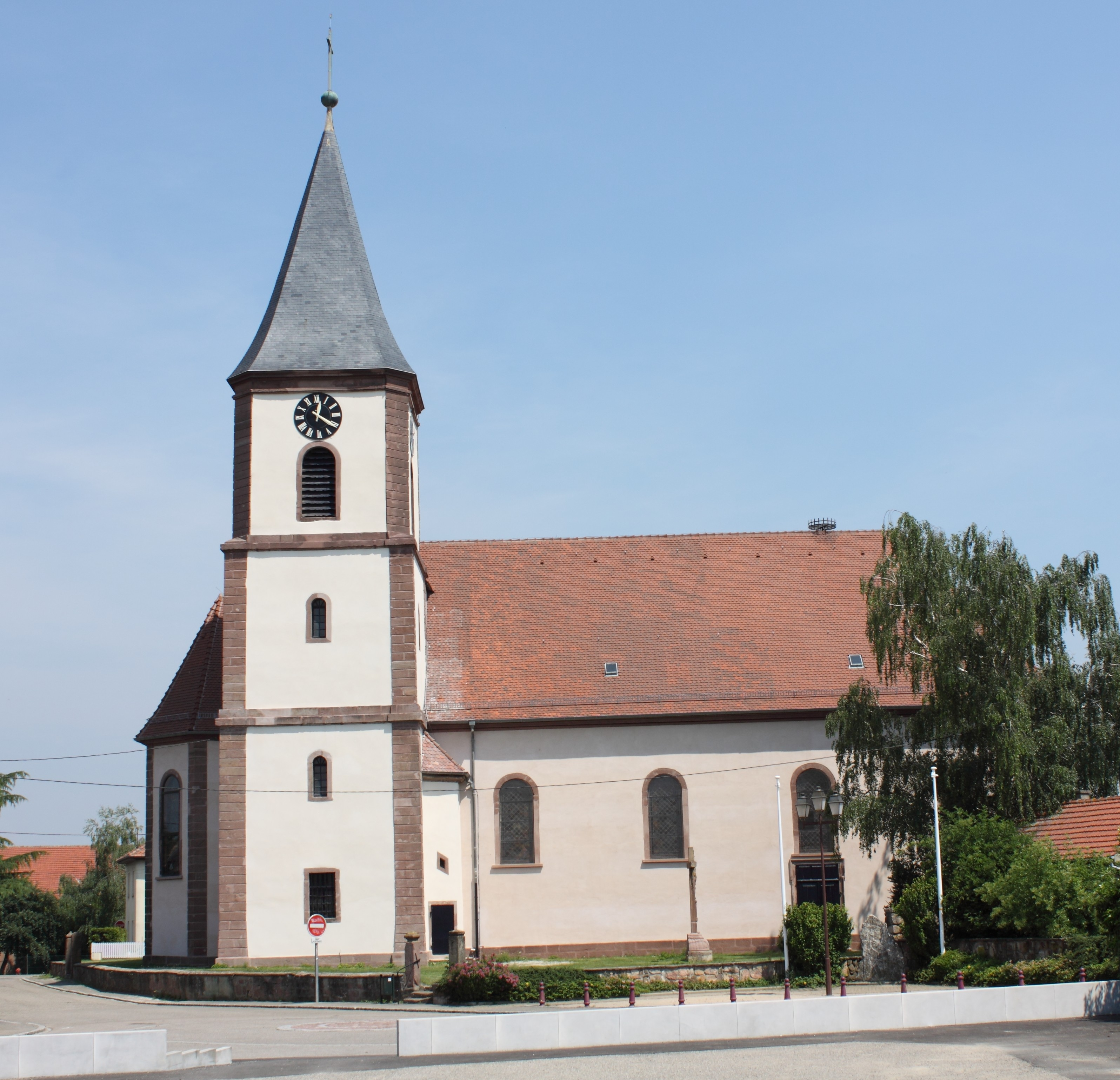 Clocher de Ruelisheim en 2010